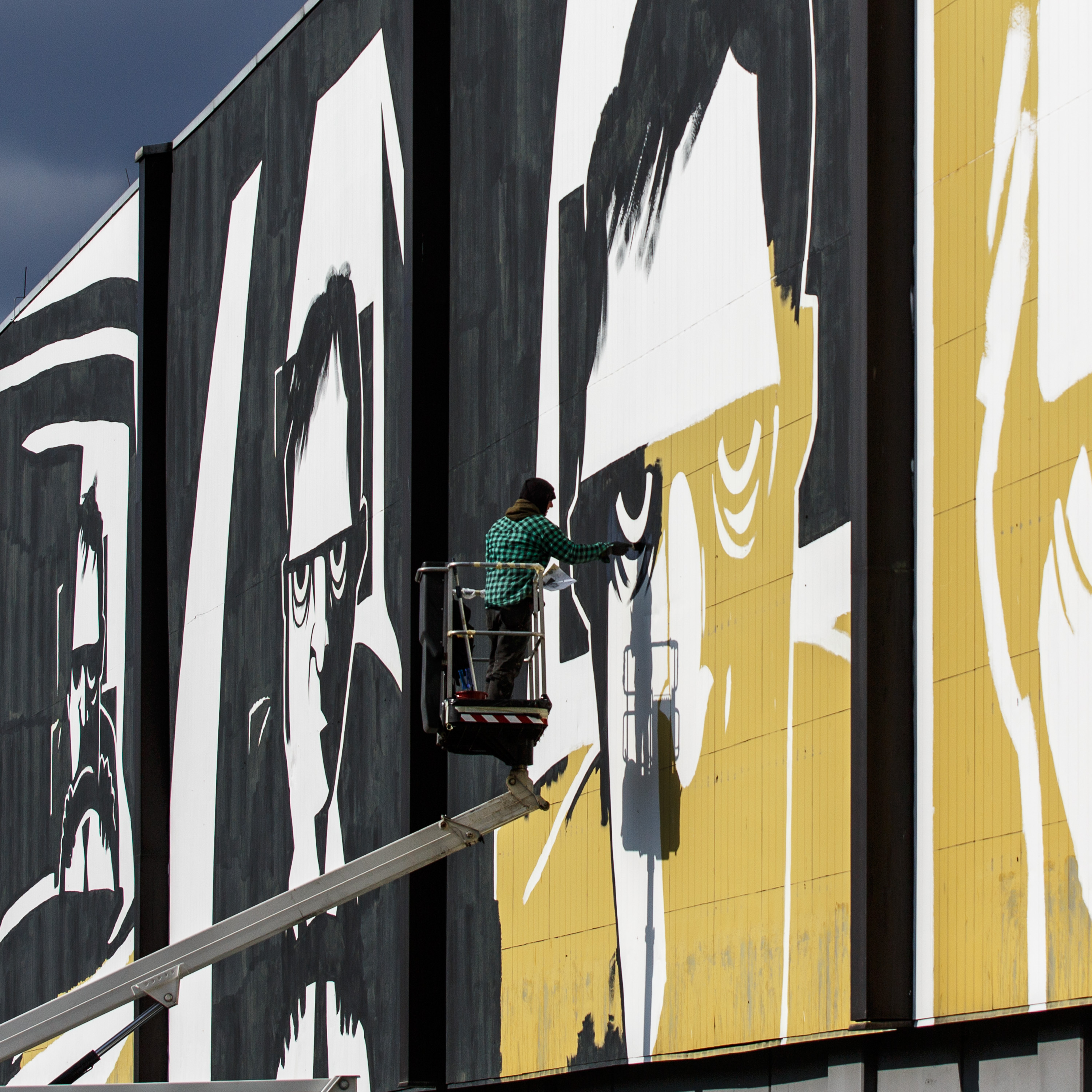 Golif at work - Anschützgasse, Wien